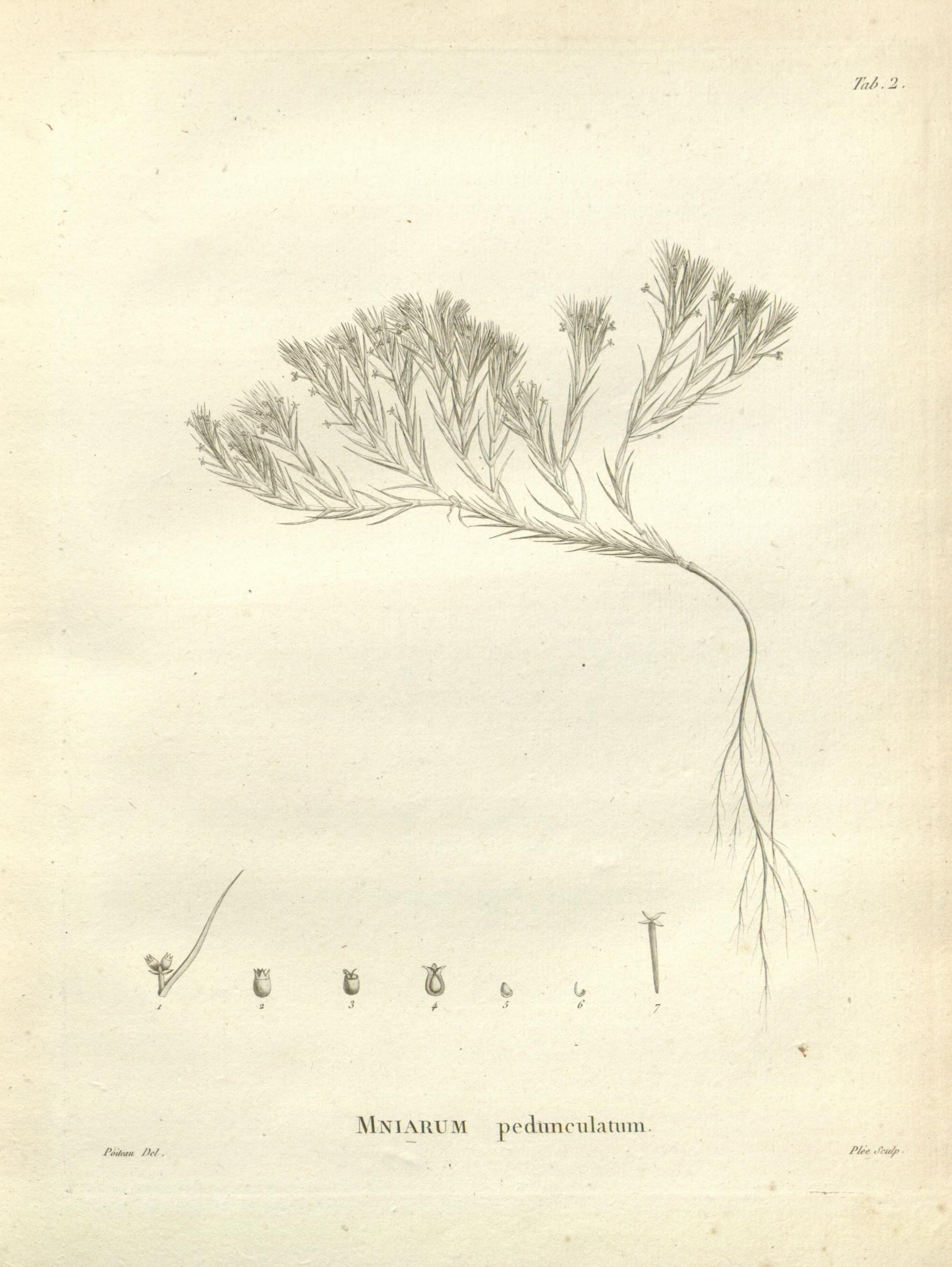 ^ j/£\l \ 'J I 'v J !'-, W, I I &» u MmAIU M pe Auricula turn.